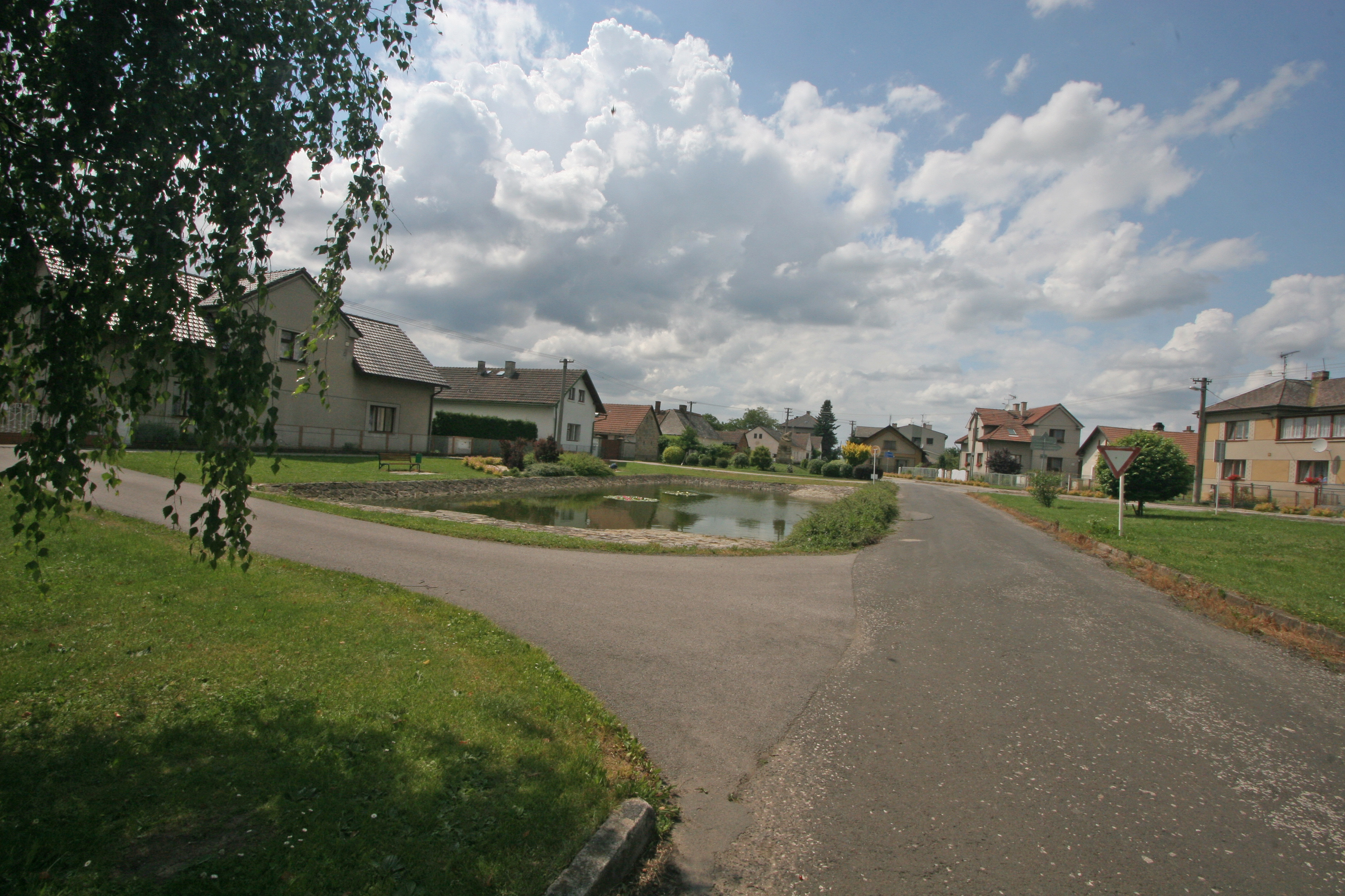 Třebnouševes návesní rybníček